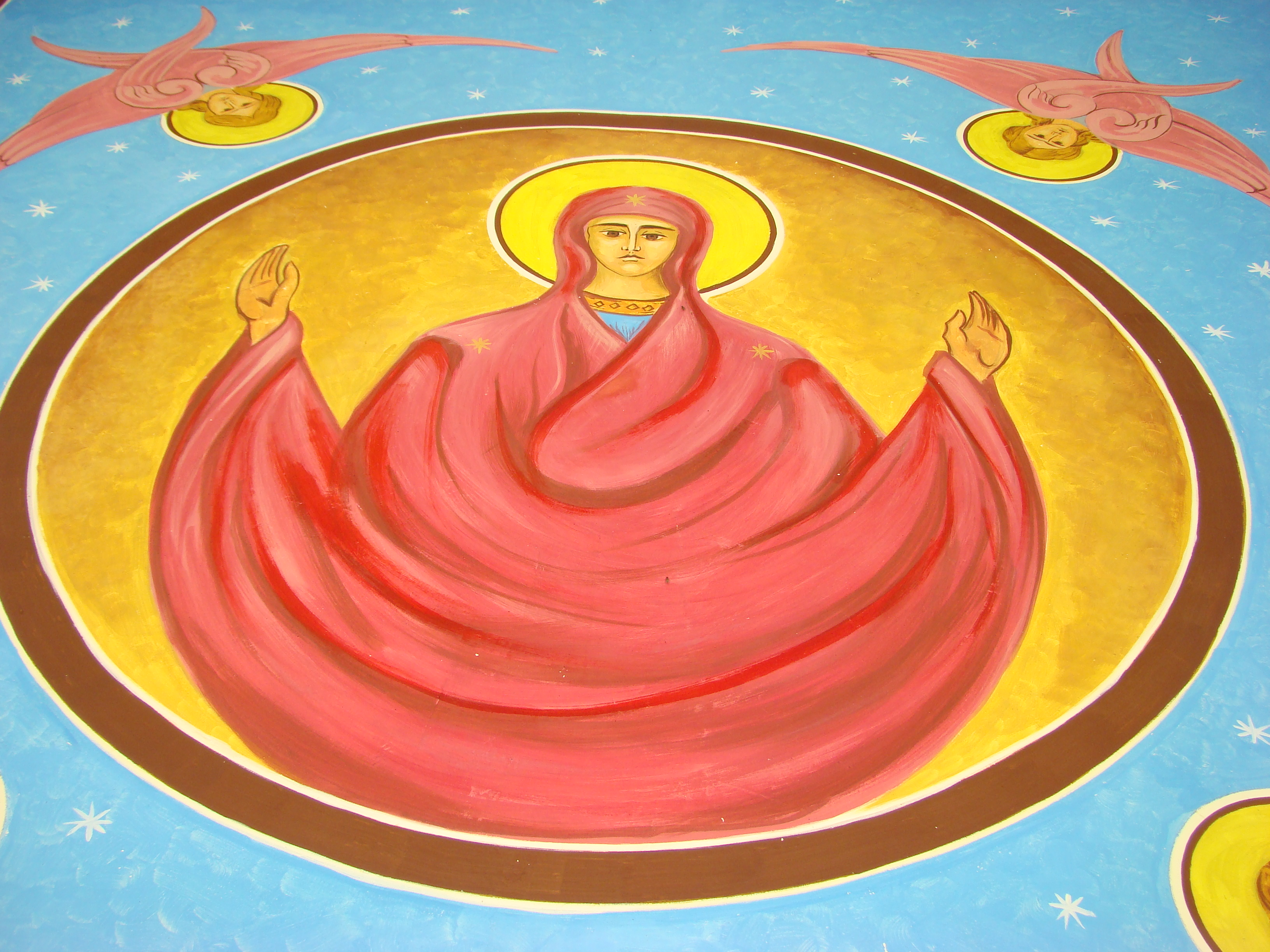 Biserica de lemn „Sfânta Treime” din satul Pădureni, comuna Mintiu Gherlii, județul Cluj